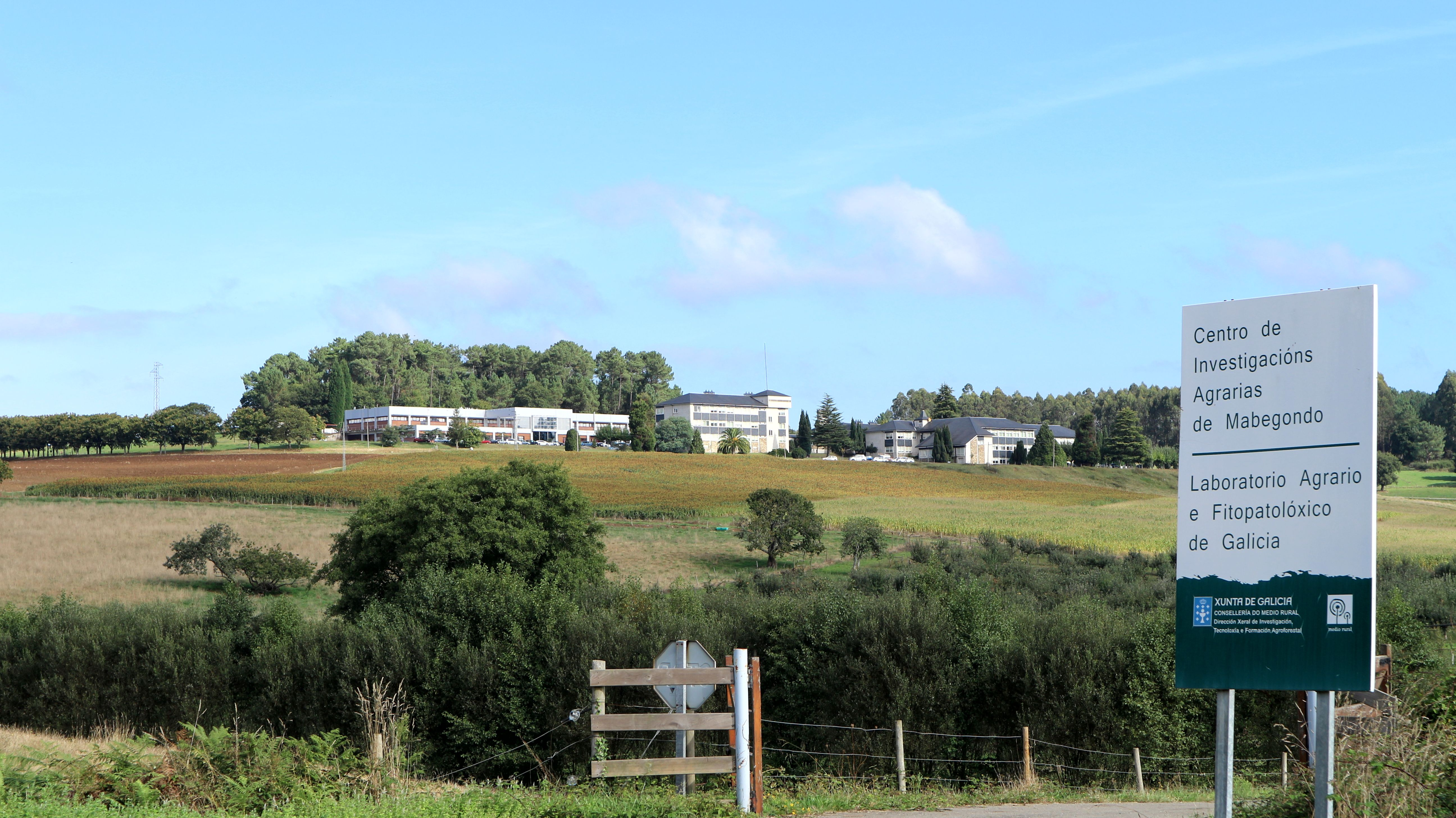 Unha das entradas do CIAM - Centro de Investigacións Agrarias de Mabegondo, en Mabegondo, Abegondo.